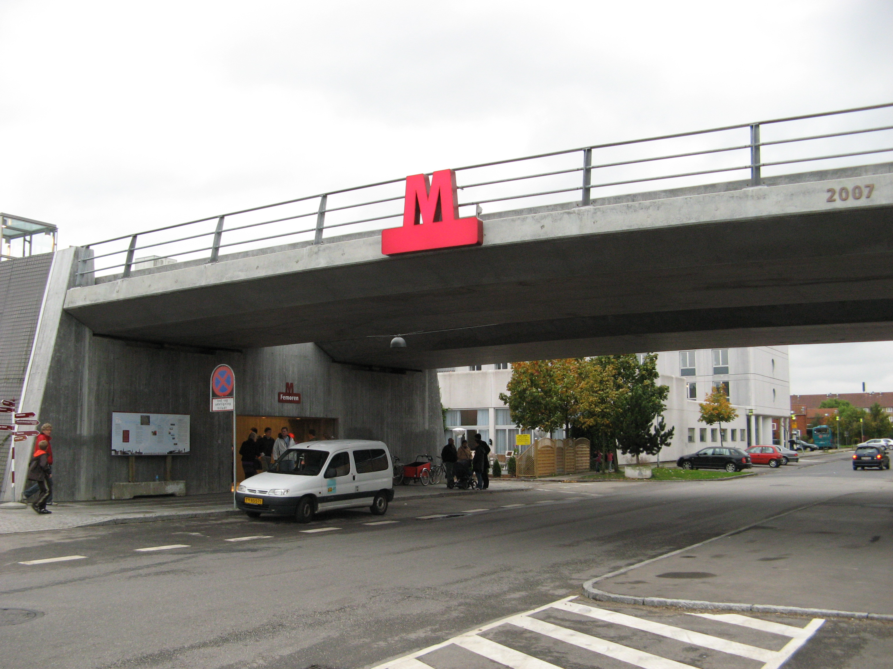 Femøren Station at the Copenhagen Metro, Denmark